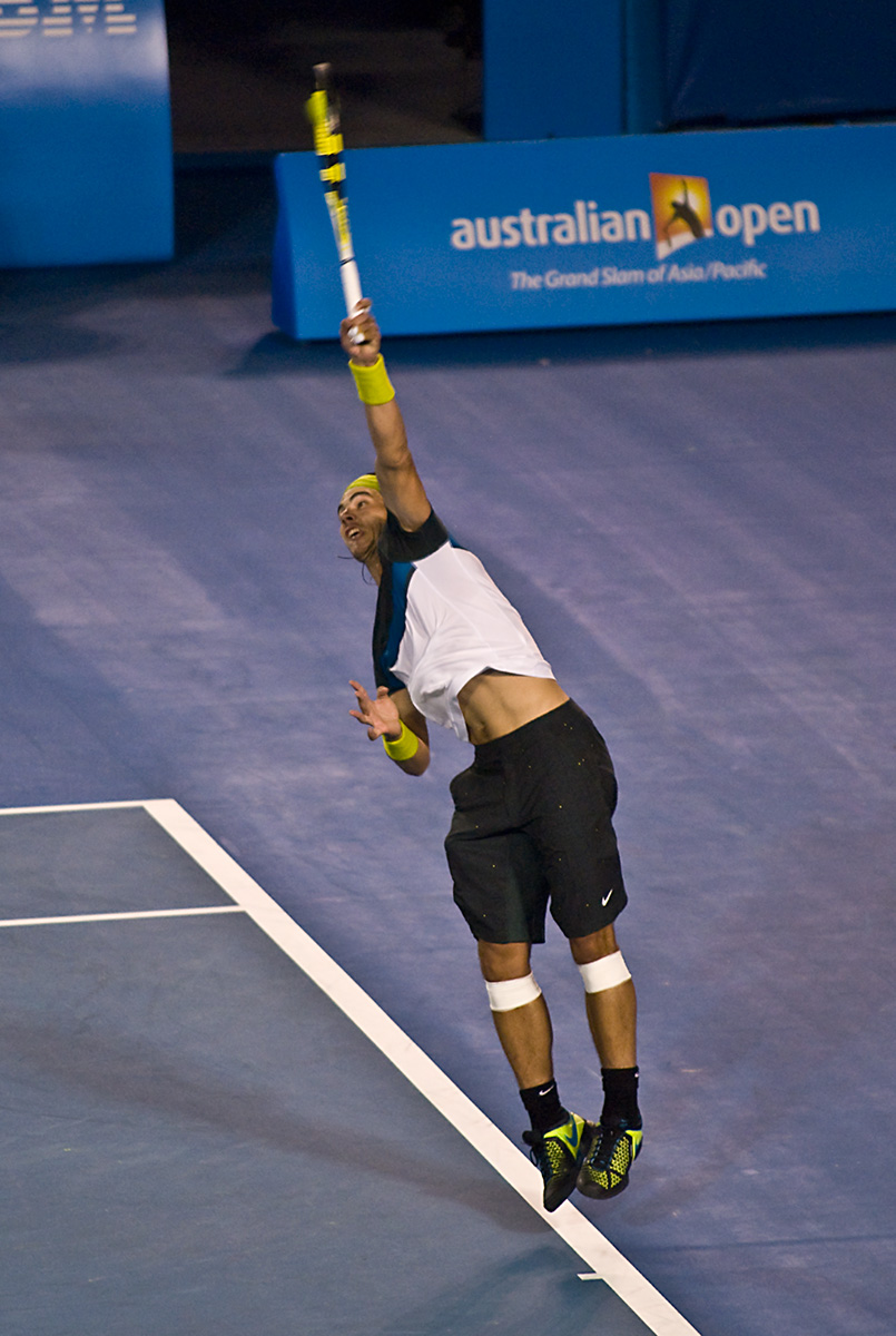 Nadal